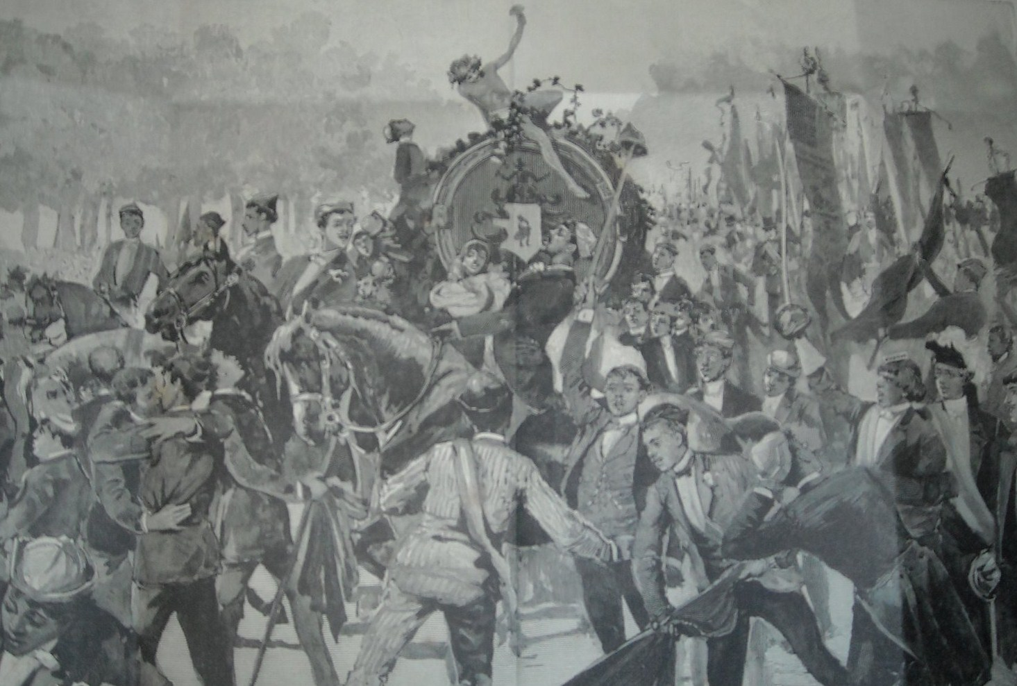 Arrivée du tonneau envoyé par les étudiants de Turin aux étudiants de Bologne pour les fêtes du VIIIème centenaire de l'université de Bologne en 1888 (légèrement recadré).